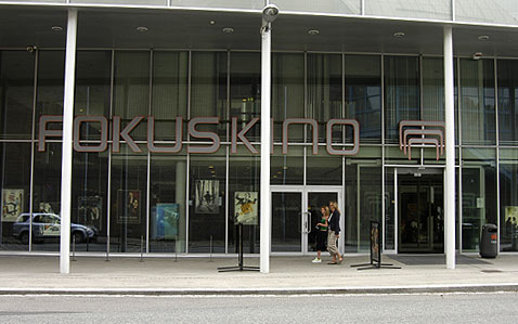 Nye Fokus Kino i Rådhuskvartalet i Tromsø. Foto: Krister Brandser